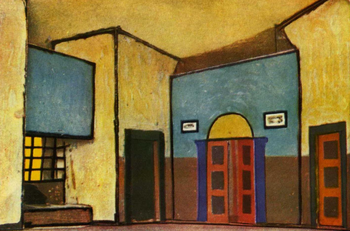 La poussière de Soleils tableau 1